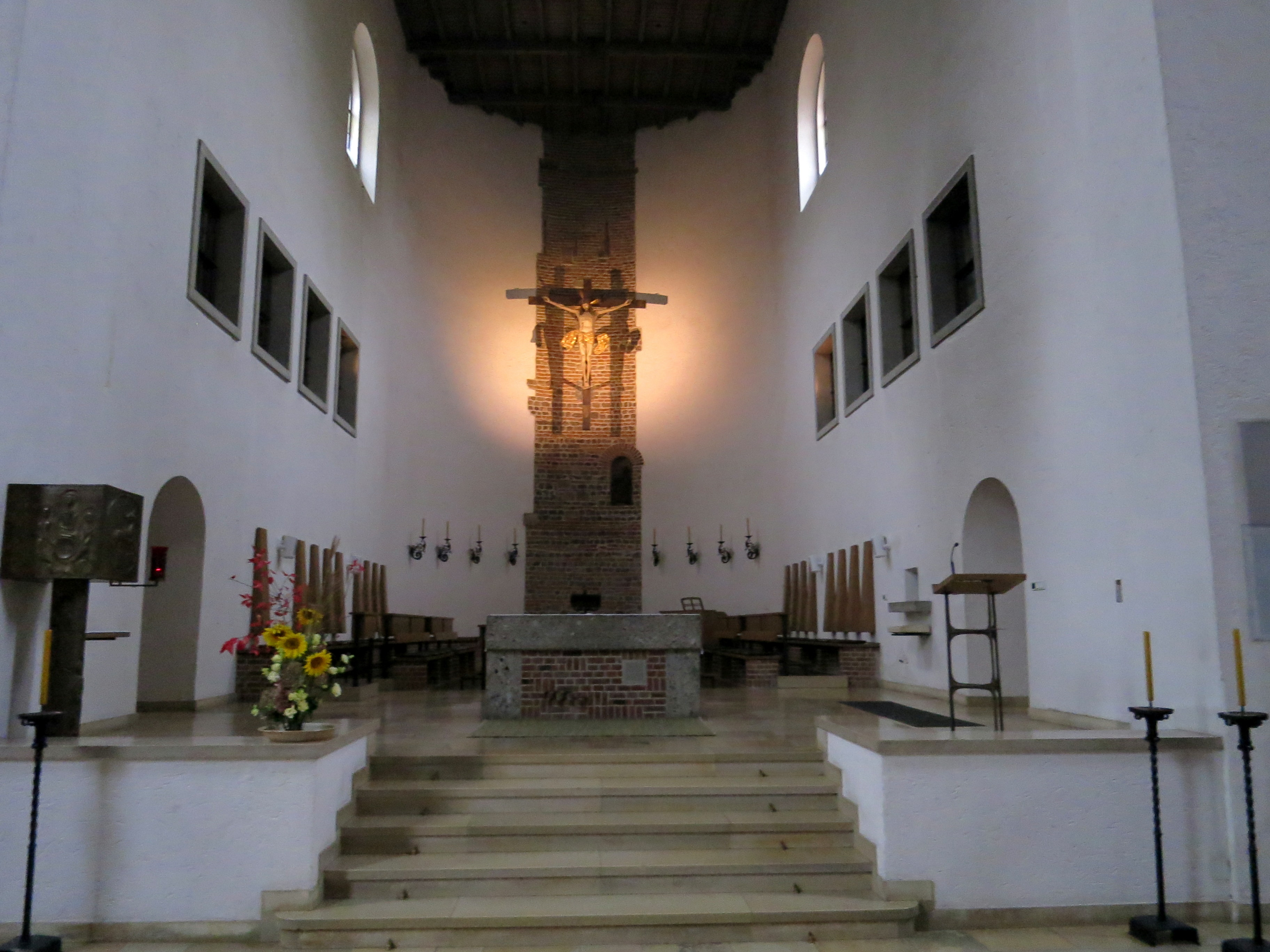 Chor und Volksaltar von St. Stephan